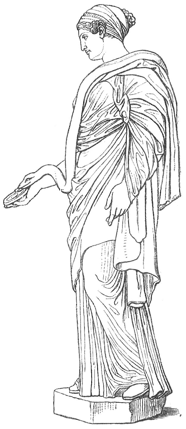 Hygieia